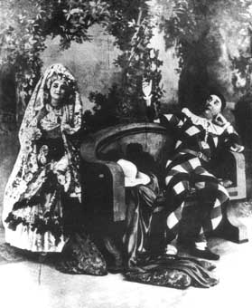 Representación de la obra de teatro La Marquesa Rosalinda del dramaturgo español Ramón de Valle-Inclán